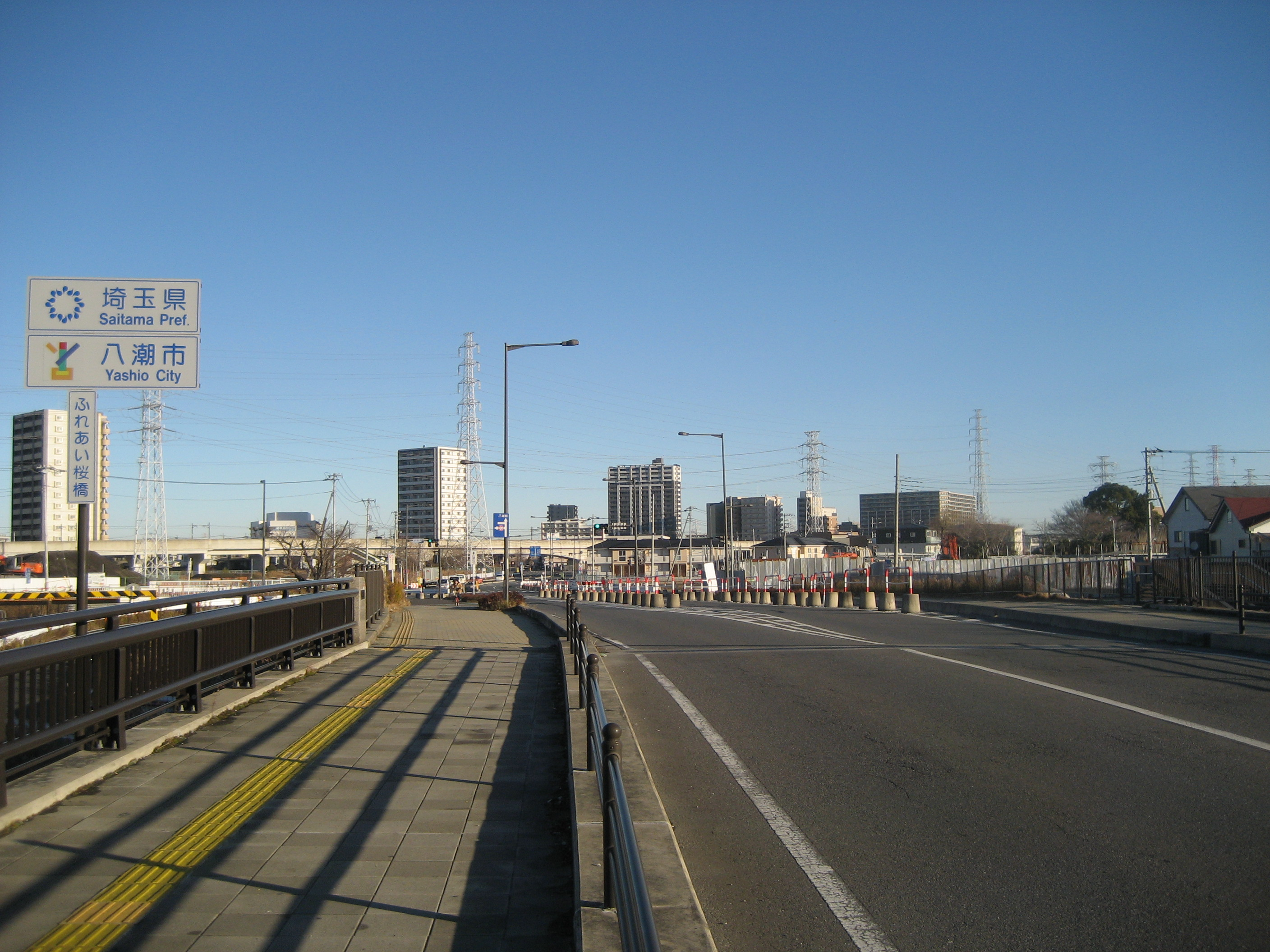 埼玉県八潮市垳（東京都足立区との境に架かるふれあい桜橋から撮影）